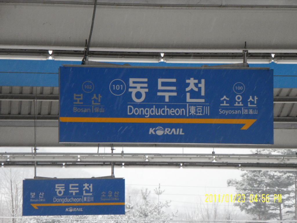 동두천역 역명판